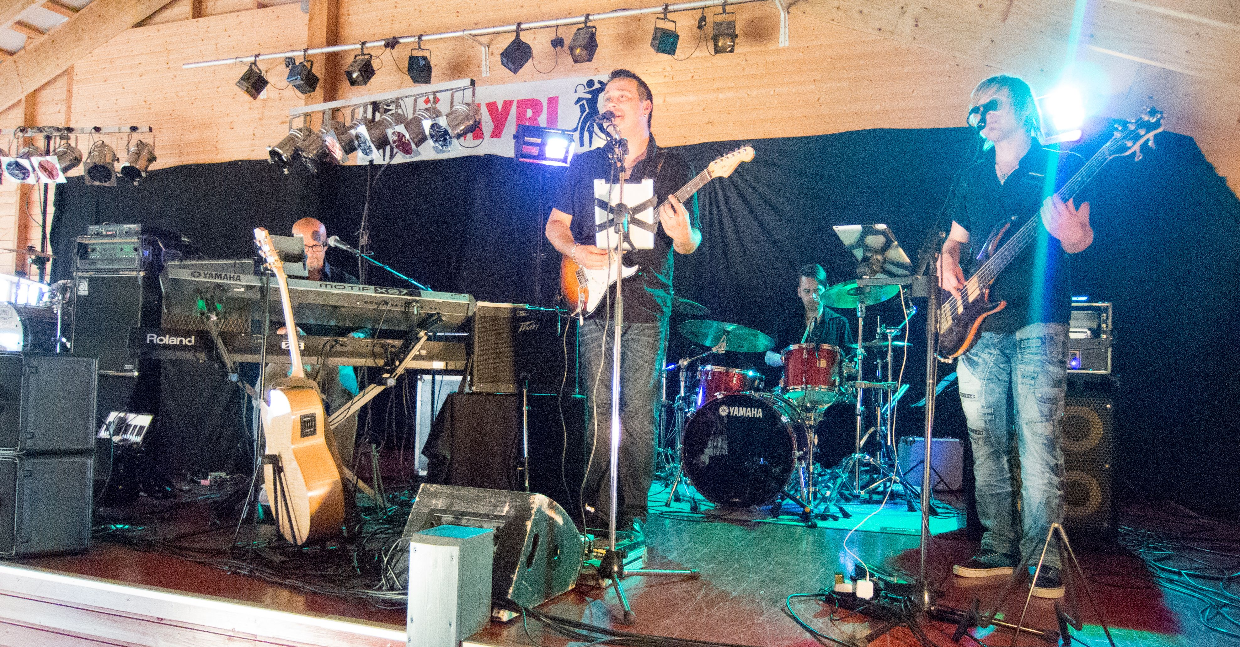 Myrskytuuli suomalainen tanssiorkesteri